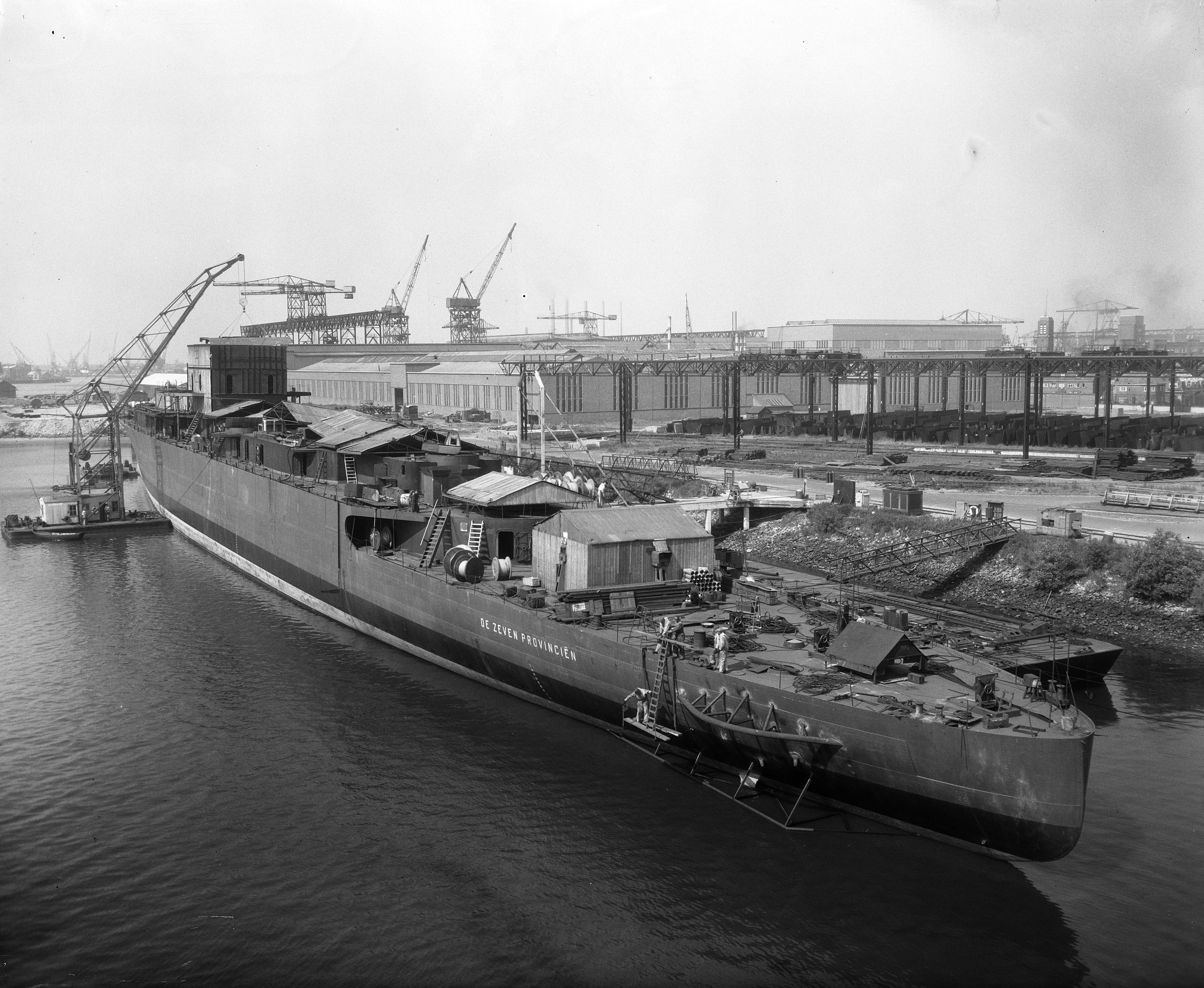 Collectie / Archief : Fotocollectie Anefo Reportage / Serie : [ onbekend ] Beschrijving : Bouw Zeven Provincien bij RDM Opdracht Volkskrant Datum : 11 juni 1951 Trefwoorden : bouw, schepen Instellingsnaam : HM De Zeven Provinciën Fotograaf : Duinen, […] van / Anefo Auteursrechthebbende : Nationaal Archief Materiaalsoort : Glasnegatief Nummer archiefinventaris : bekijk toegang 2.24.01.09 Bestanddeelnummer : 904-6133